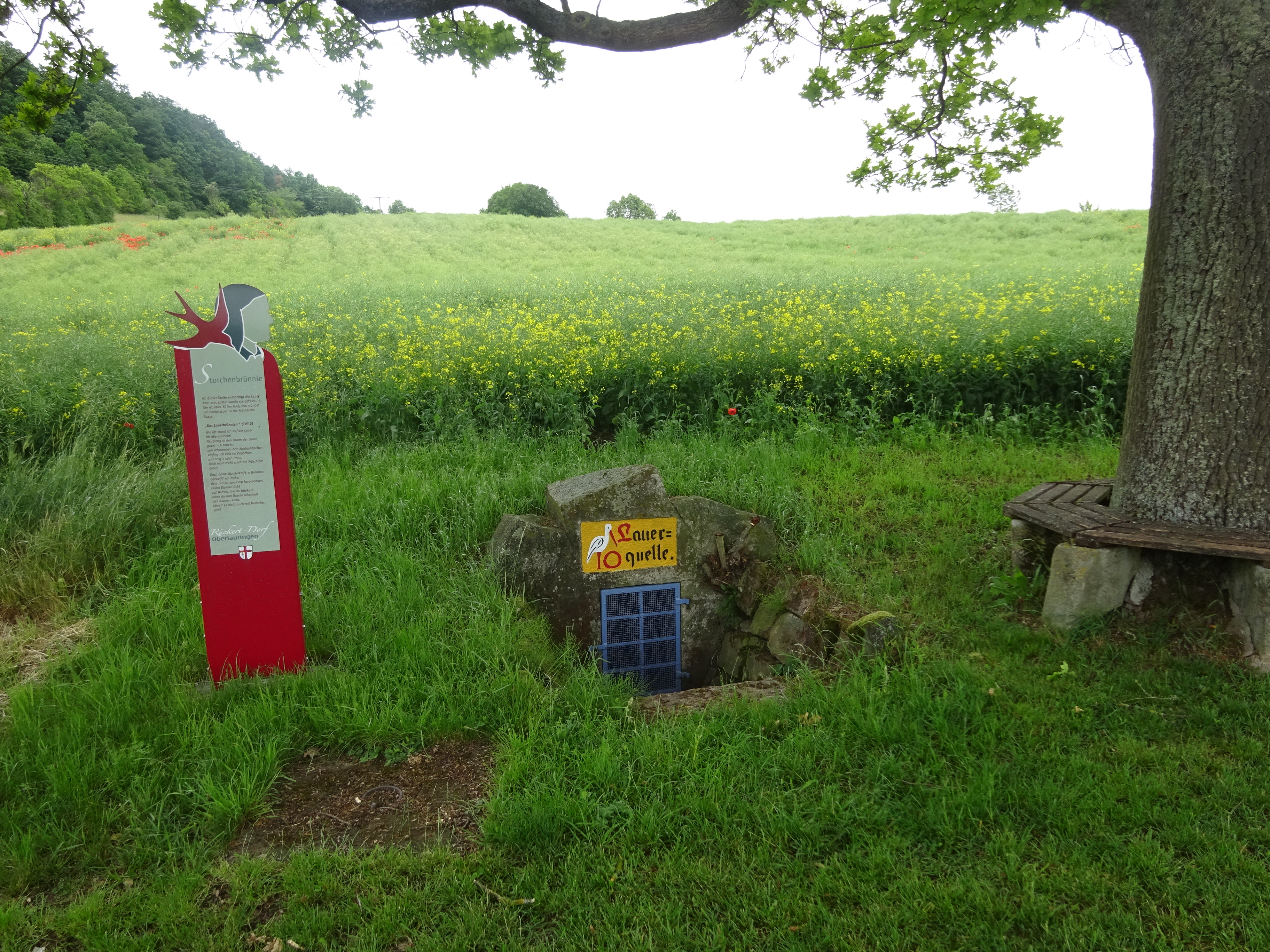 Lauerquelle auf dem Rückert-Rundweg